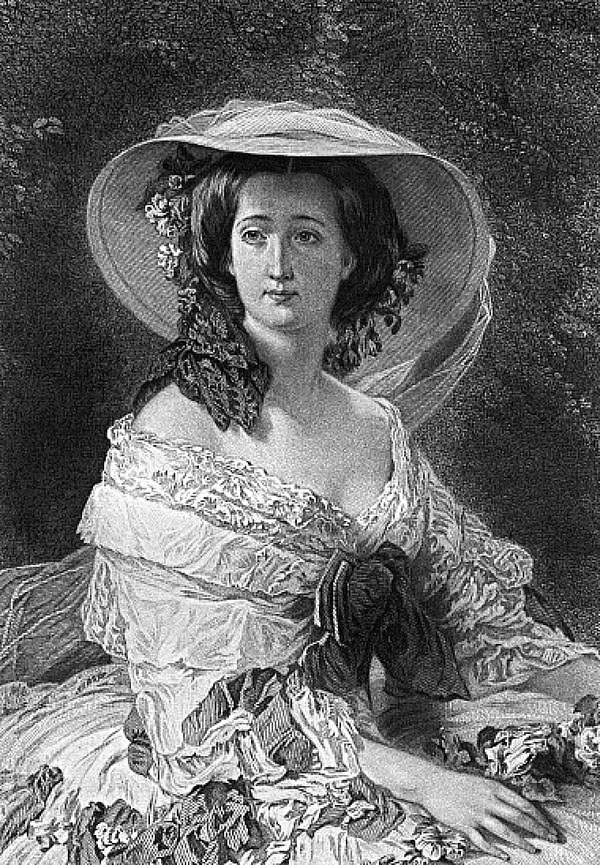 Empress Eugenie